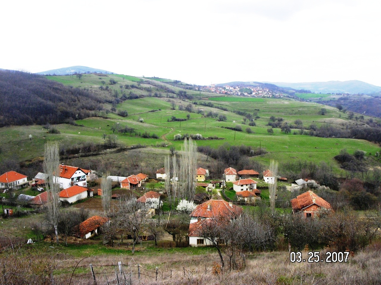 Lagjëja e poshtme